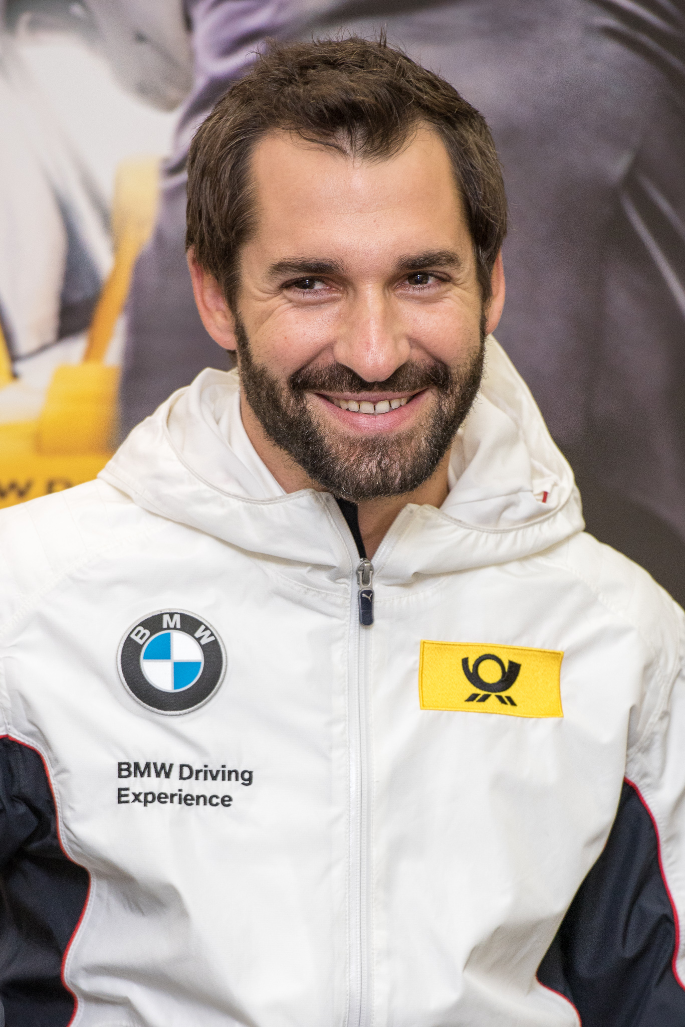 DTM,Deutsche Tourenwagen Masters,Hockenheimring,Motorsport,Timo Glock